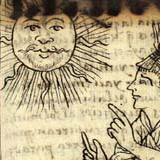 (Ausschnitt von Bild:Capac Raymi.jpg) 80px Inti der Sonnengott der Inkas als Sonnenscheibe mit Gesicht und Flammen dargestellt. (El duodécimo mes, diciembre; Qhapaq Inti Raymi, mes de la festividad del señor sol) El primer nueva corónica y buen gobierno (1615/1616), S. 260 Heruntergeladen von